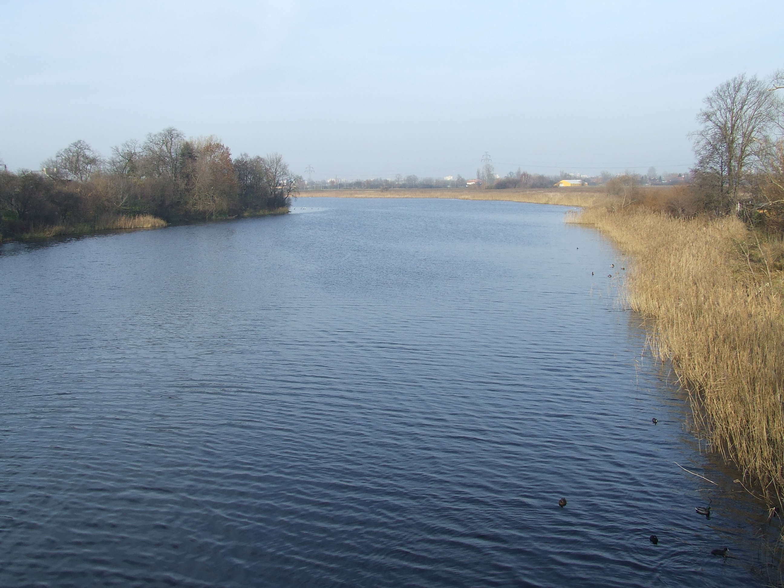 Jezioro Czerniakowskie, Warszawa, ul. Augustówka